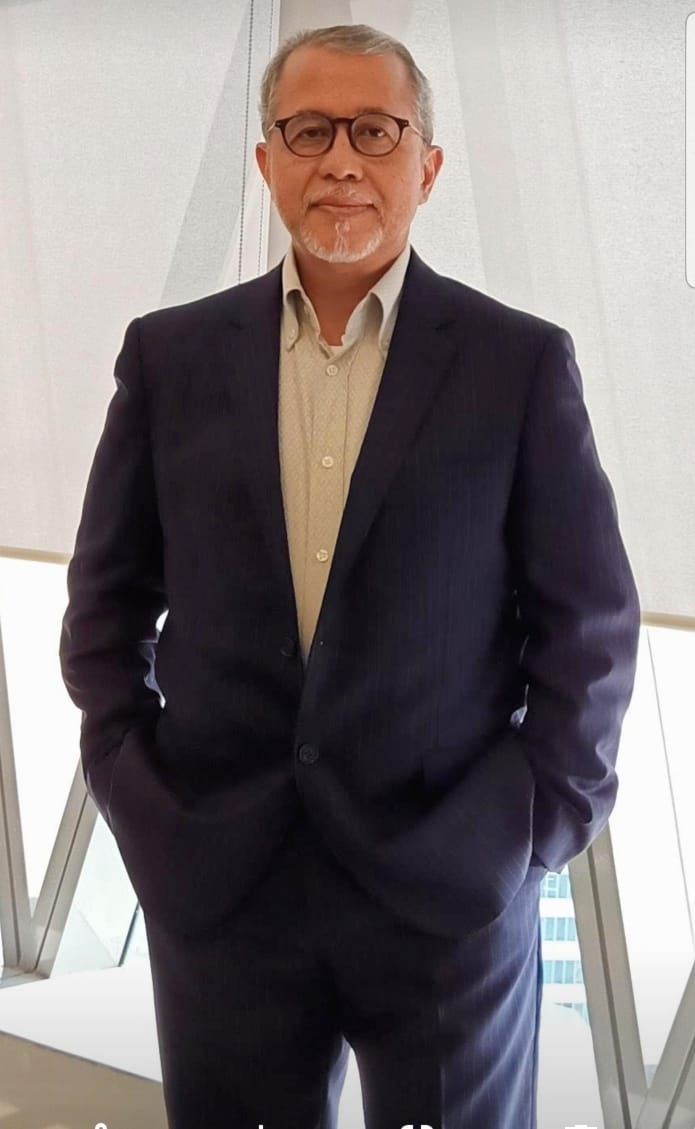 Advokat Indonesia